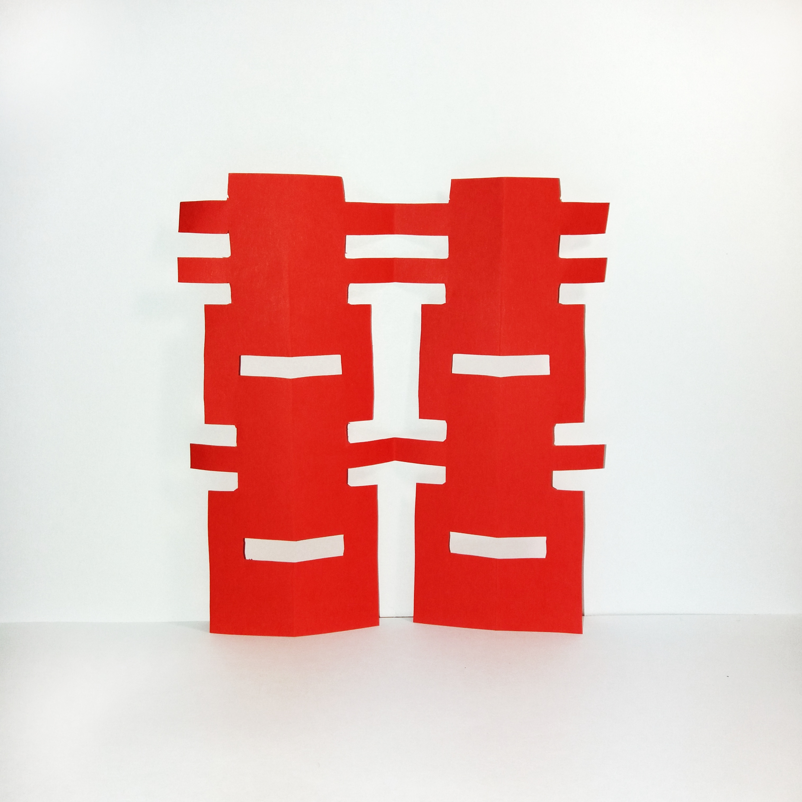 ієрогліф виготовлений у техніці цзяньчжі